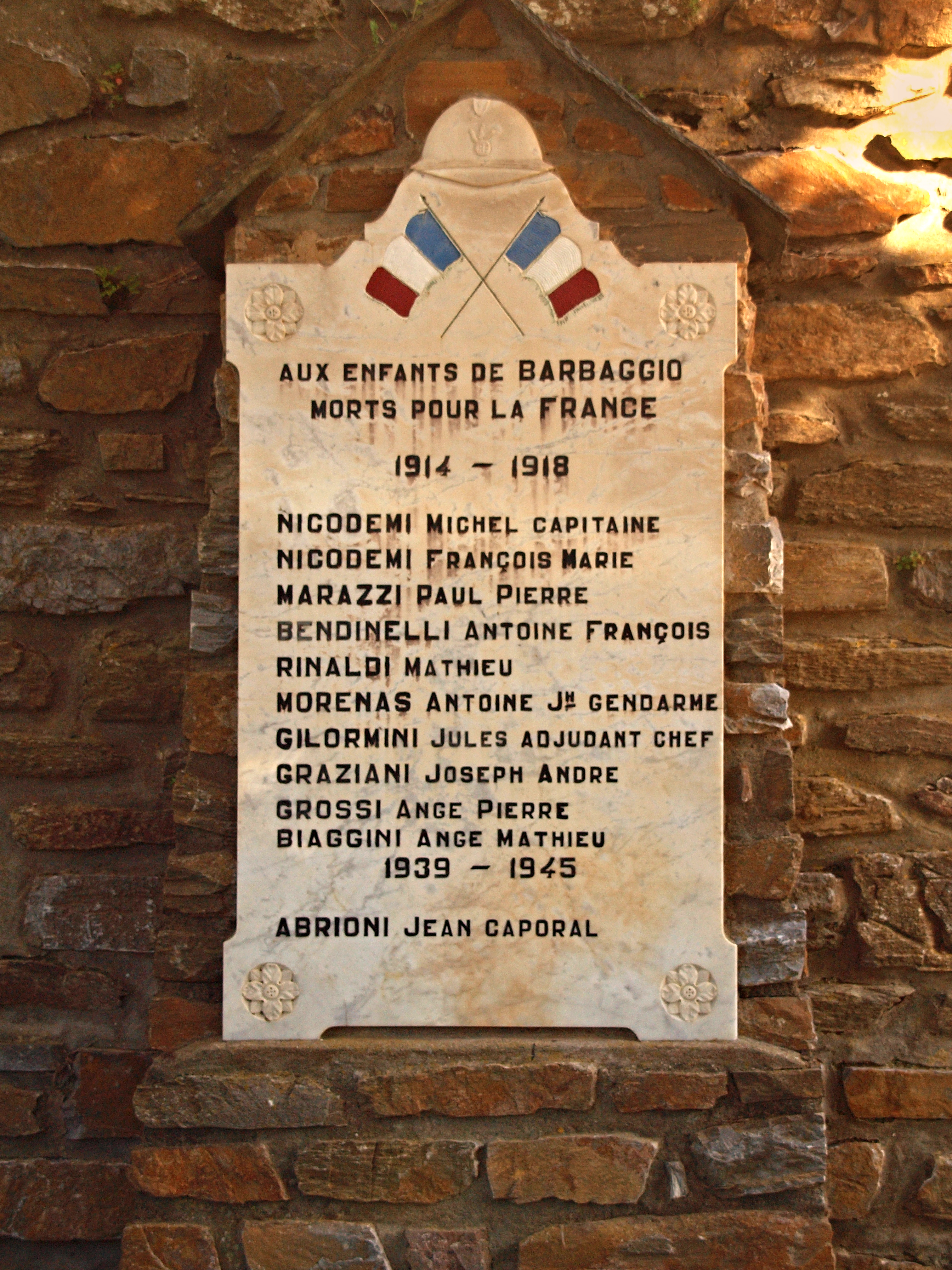 Barbaggio (Corse) - Monument aux morts 14-18